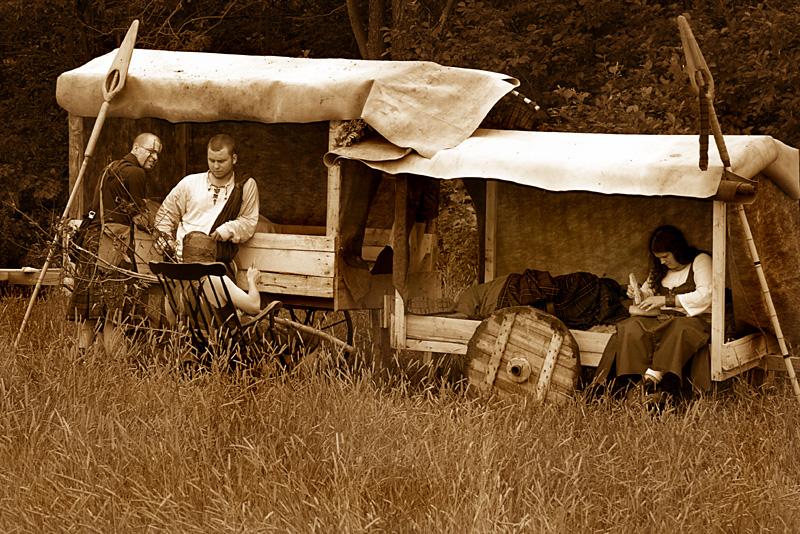 Groupes de joueurs lors de l'activité "Bélénos 2 2004"